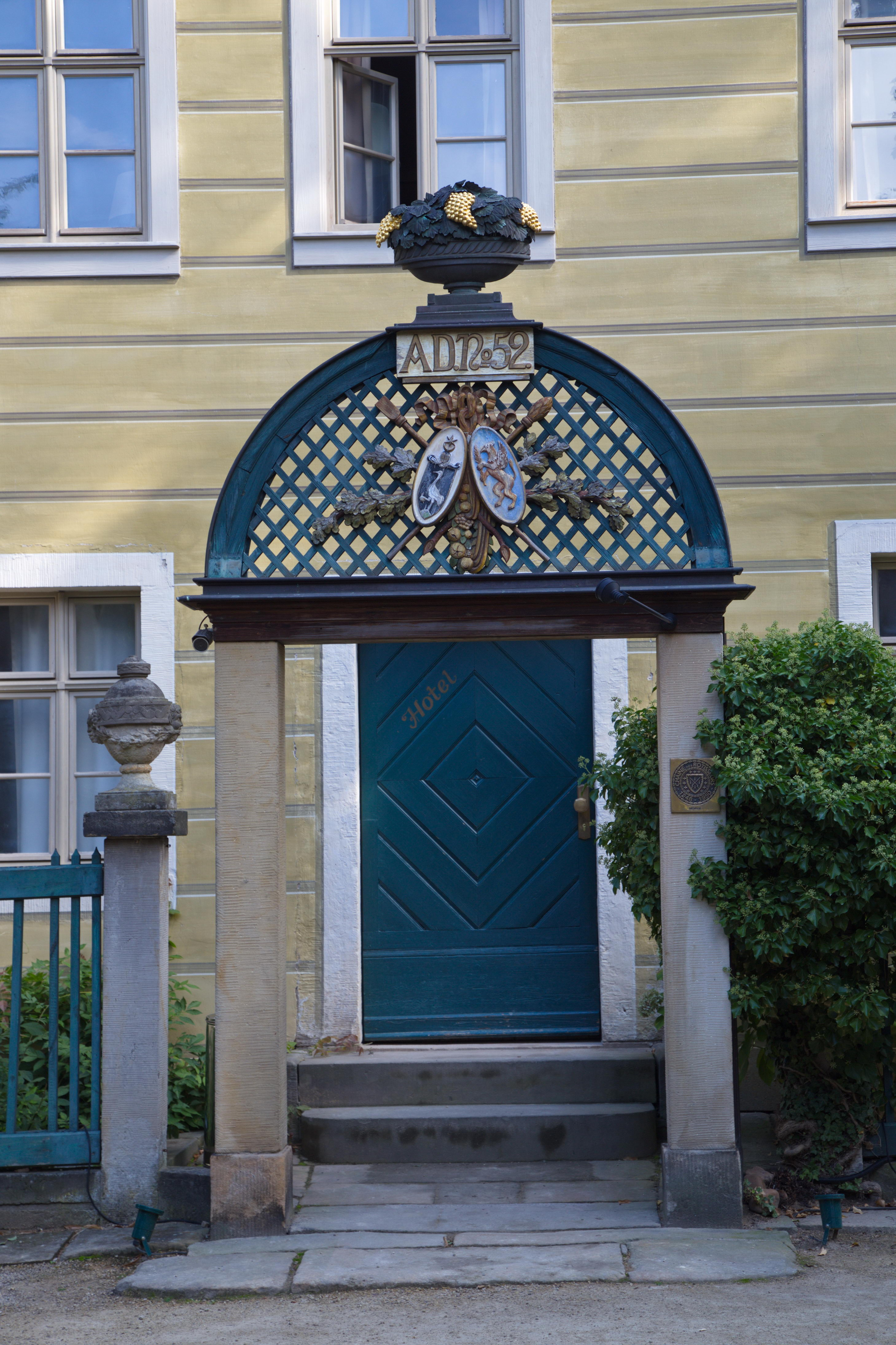 Radebeul, Haus Sorgenfrei, Augustusweg 48